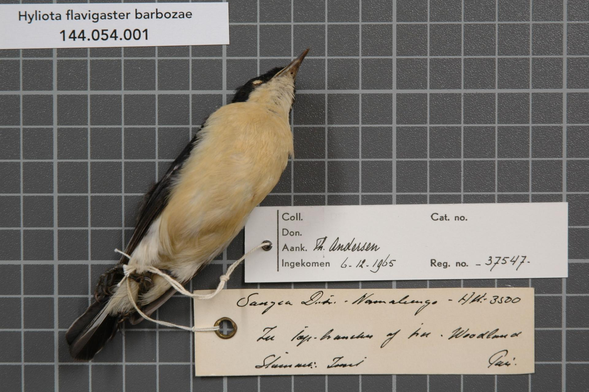 Hyliota flavigaster barbozae Hartlaub, 1883